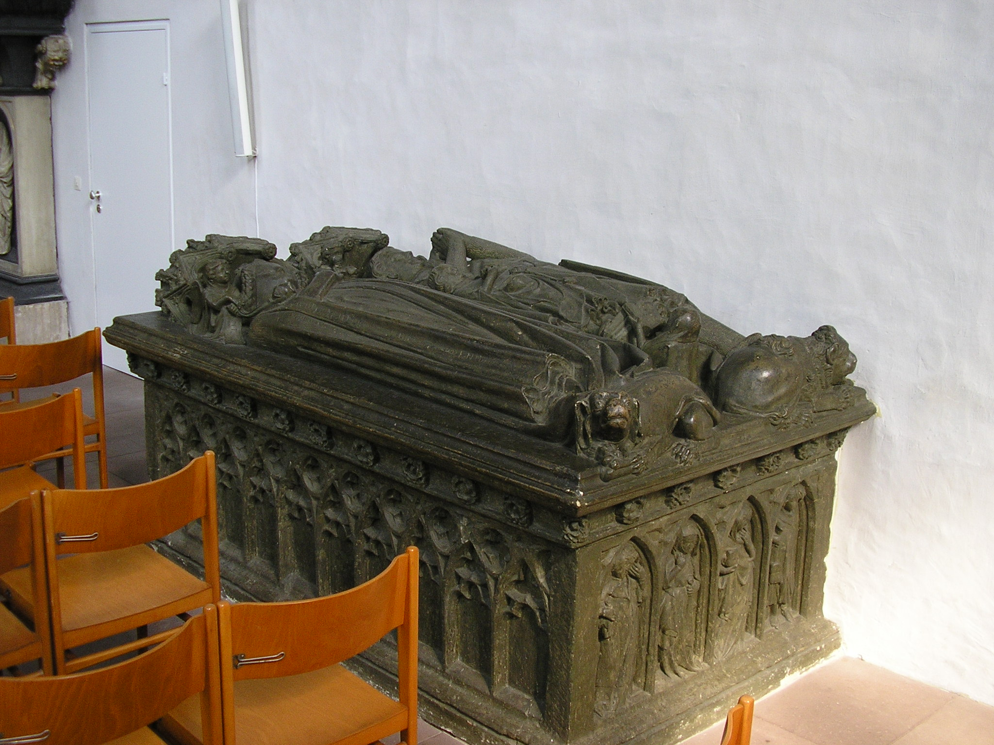 Marienkirche, Grabmal Ottos III. von Ravensberg und seiner Frau Hedwig zur Lippe.